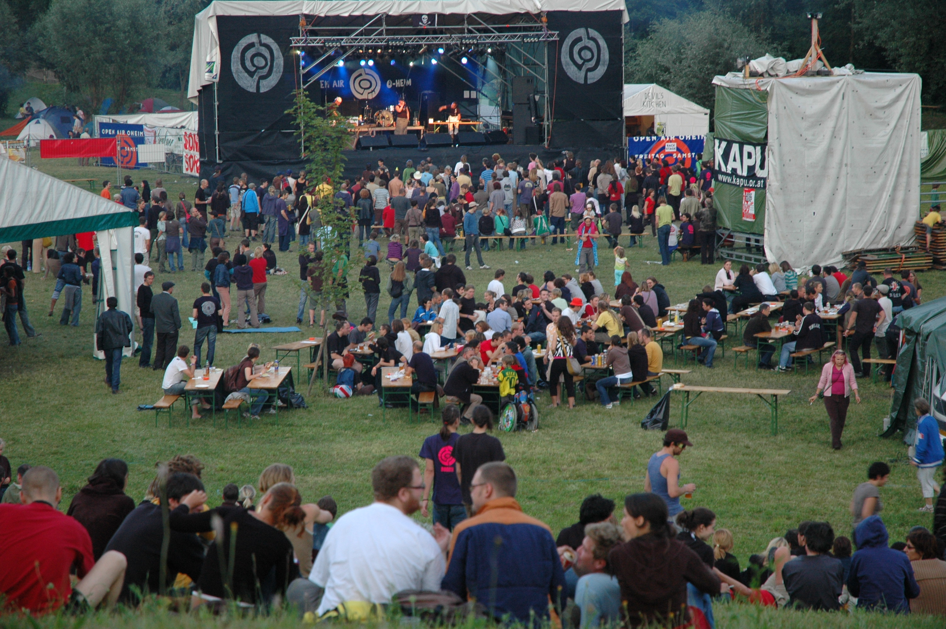 Open Air Ottensheim 2007 - Blick vom Damm auf das Festivalgelände (im Hintergrund: das Campinggelände; hinter den Bäumen versteckt: die Rodl, die dort in die Donau mündet; Konzert auf der Bühne: "Mieze Medusa & Tenderboy")